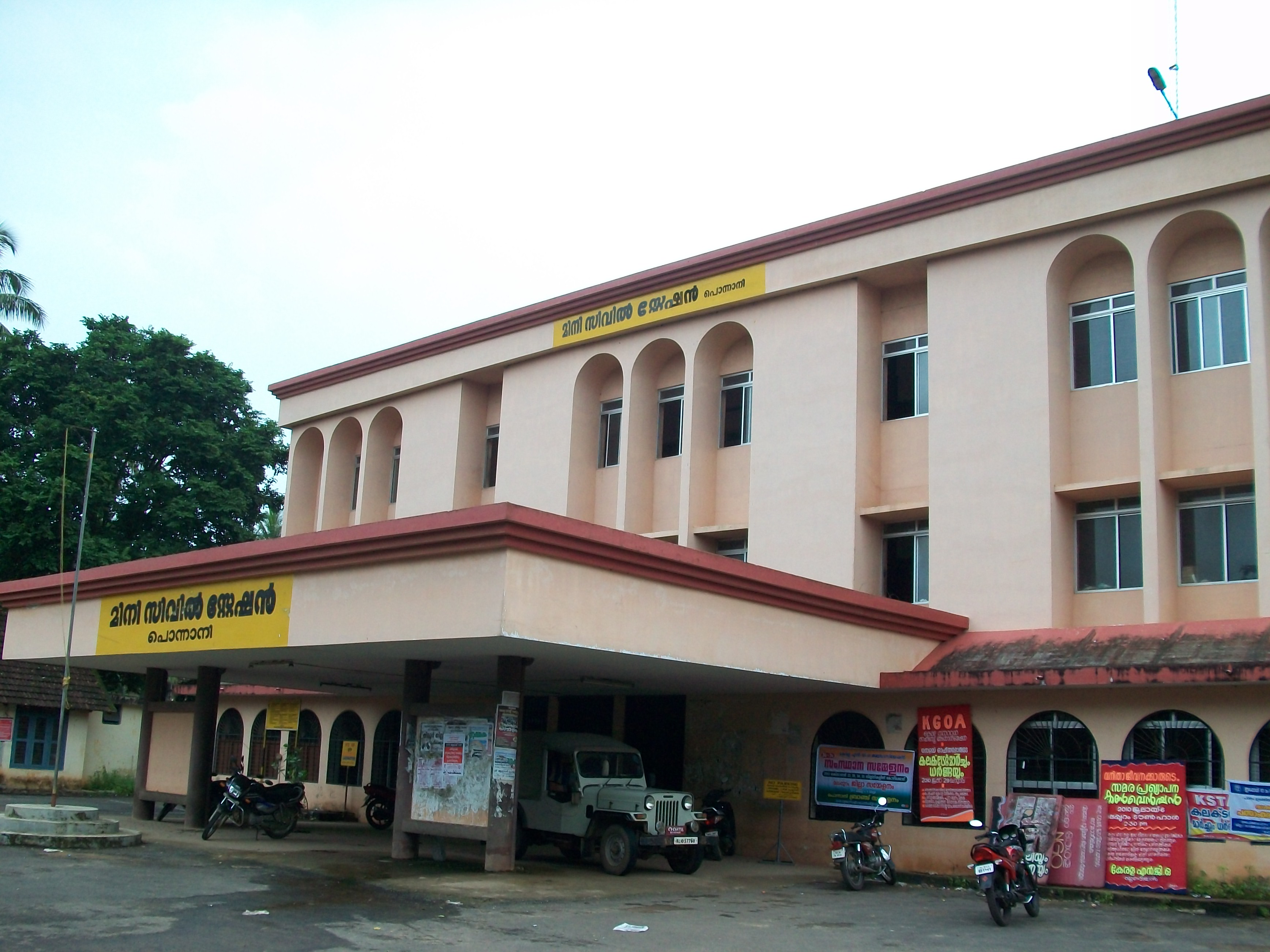 പൊന്നാനിയിലെ മിനി സിവിൽസ്റ്റേഷൻ